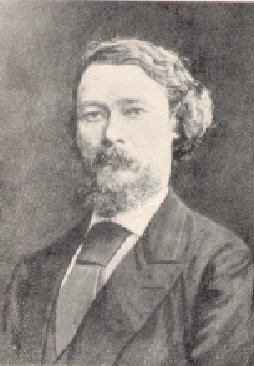 Karl Rudolph König, German physicist.